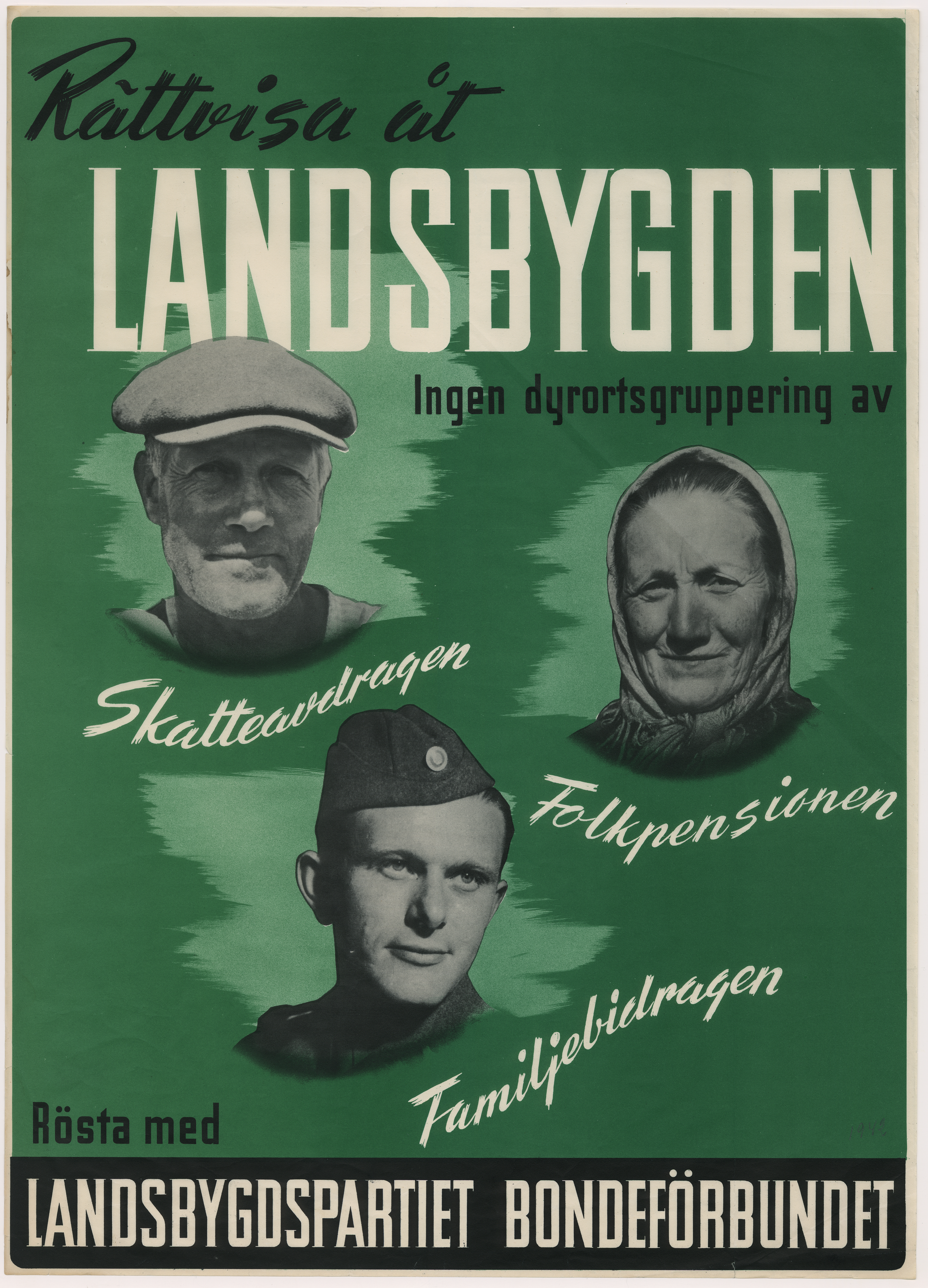 Valaffisch för Bondeförbundet 1945. "Rättvisa åt landsbygden. Ingen dyrortsgruppering av skatteavdragen, folkpensionen, familjebidragen. Rösta med Landsbygdspartiet Bondeförbundet"